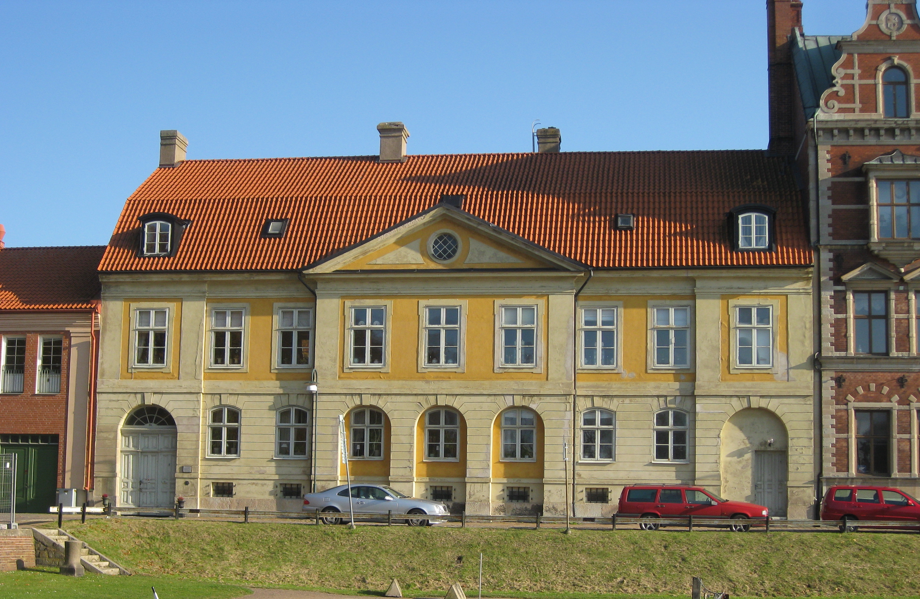 Fortifikationshuset, byggnadsminne i Landskrona